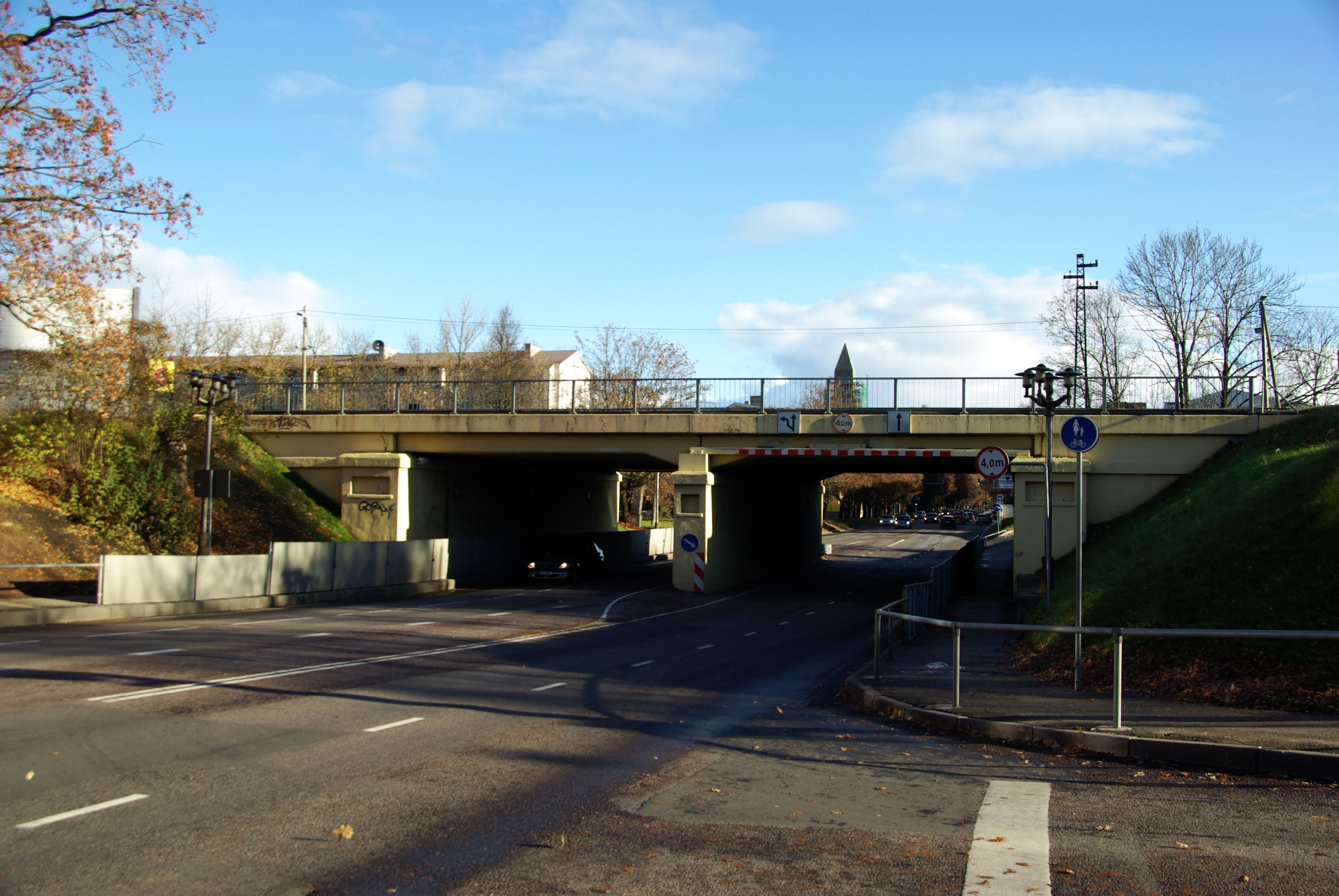 Tartu raudteesild, ületab Riia tänava lõigul Vaksali tänava ja Raudtee tänava vahel.